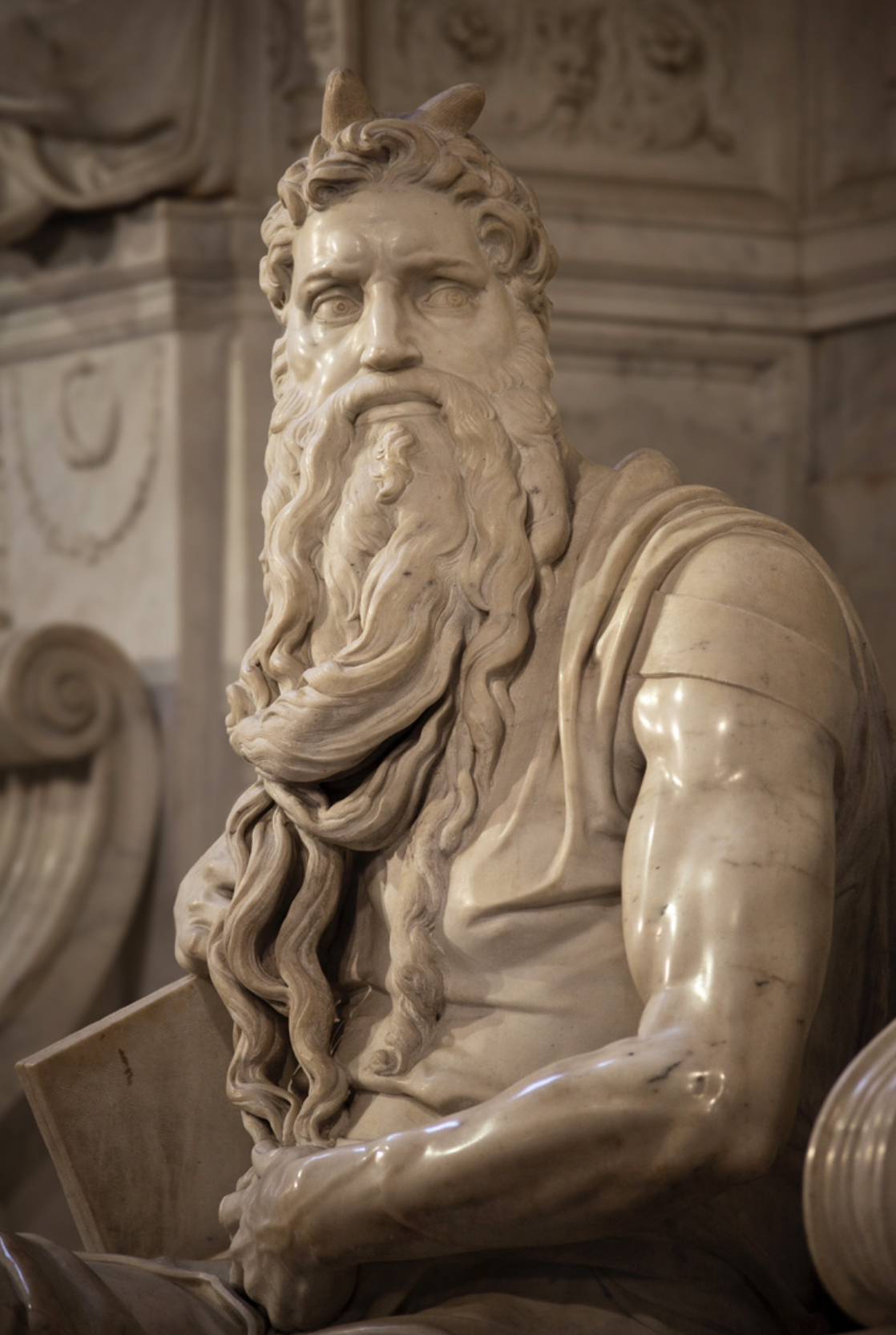 Die Statue des Mose von Michelangelo als Teil des Grabmals für Papst Julius II. in der Kirche San Pietro in Vincoli in Rom